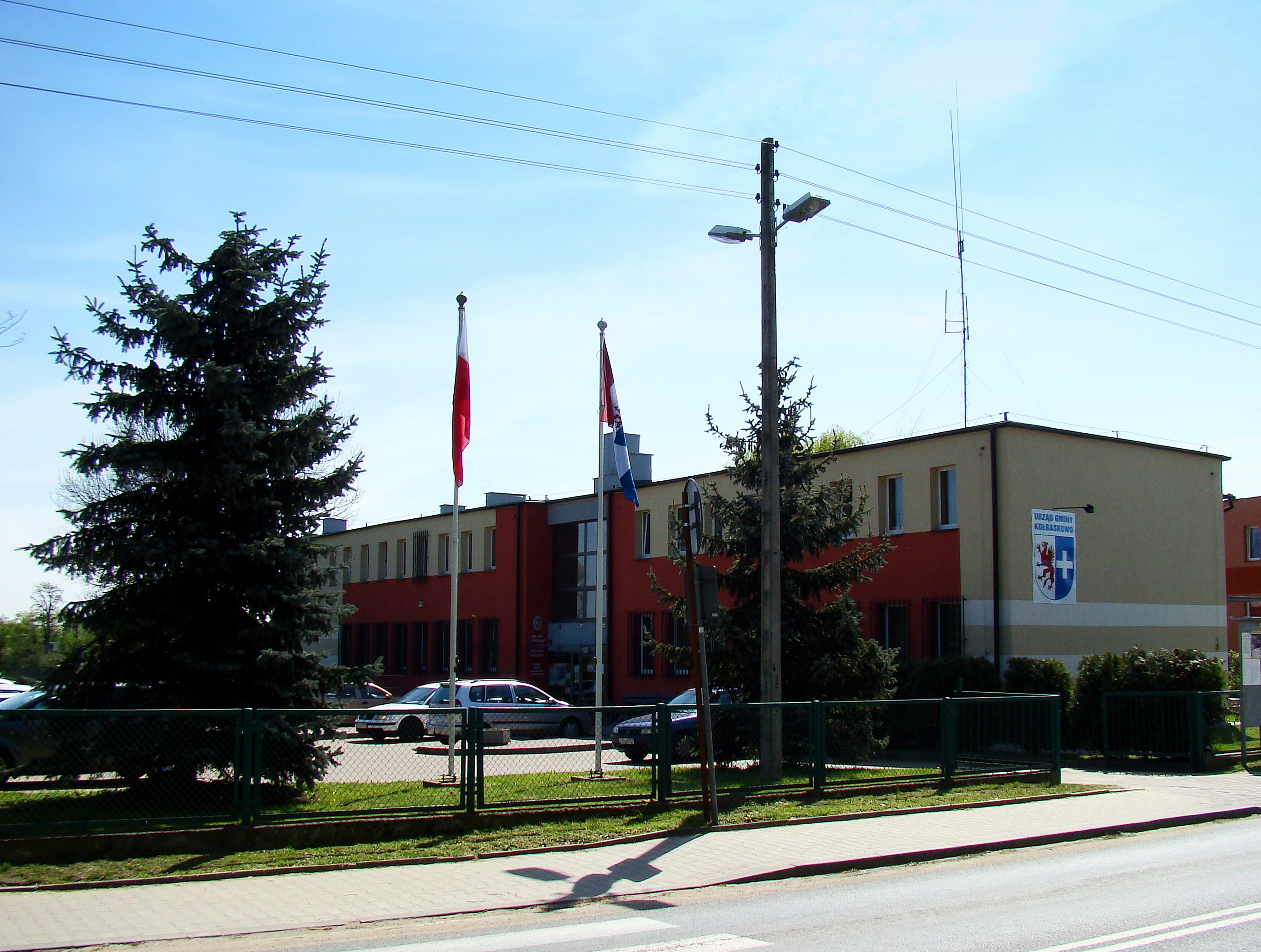 Kołbaskowo, Urząd gminy, (Gmina Kołbaskowo, Powiat policki, Województwo zachodniopomorskie), Polska